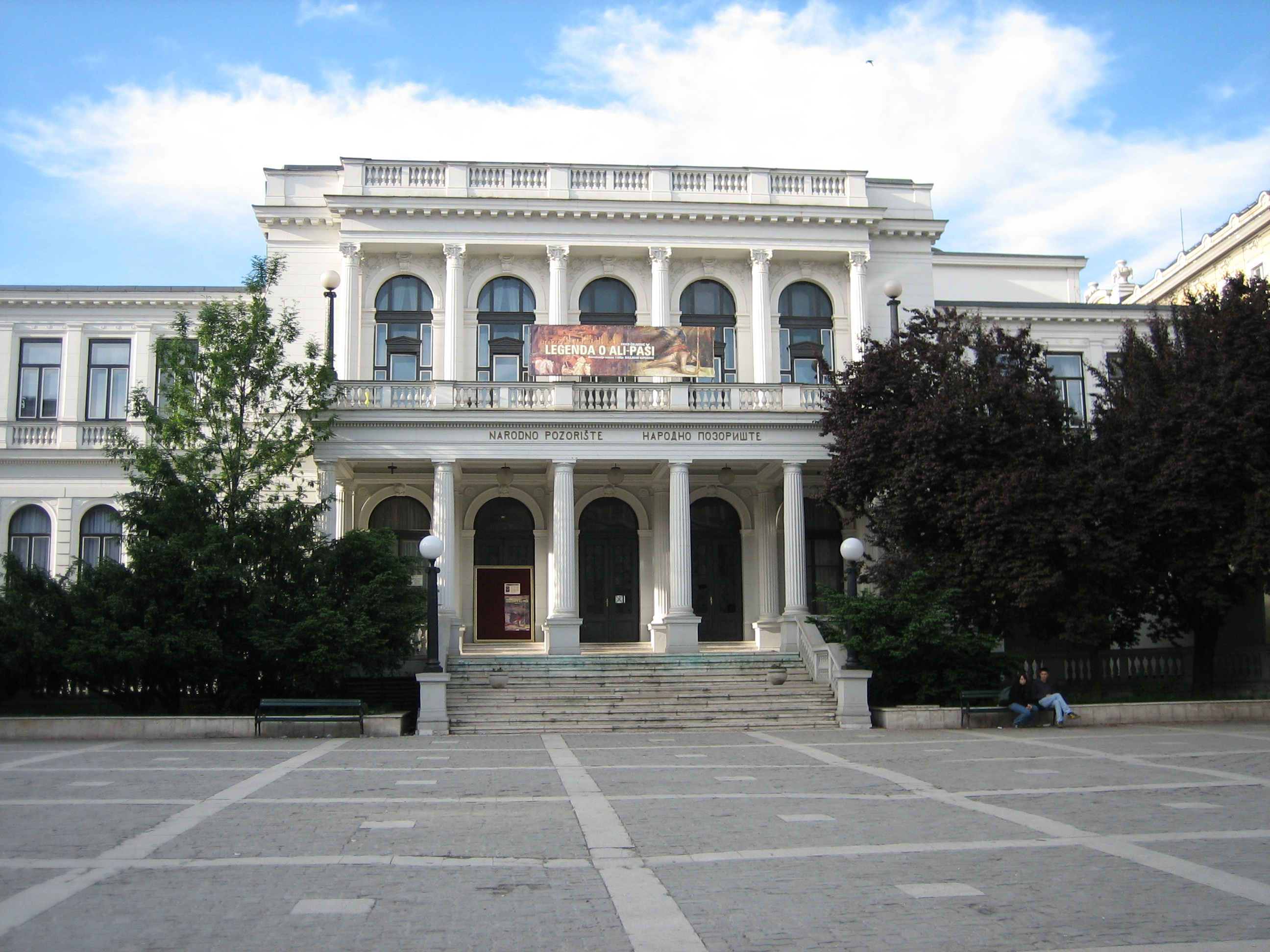 Bildbeschreibung: Sarajevo, Nationaltheater Quelle: selbst fotografiert Fotograf: Niels Gatzke Datum: 27.05.2006